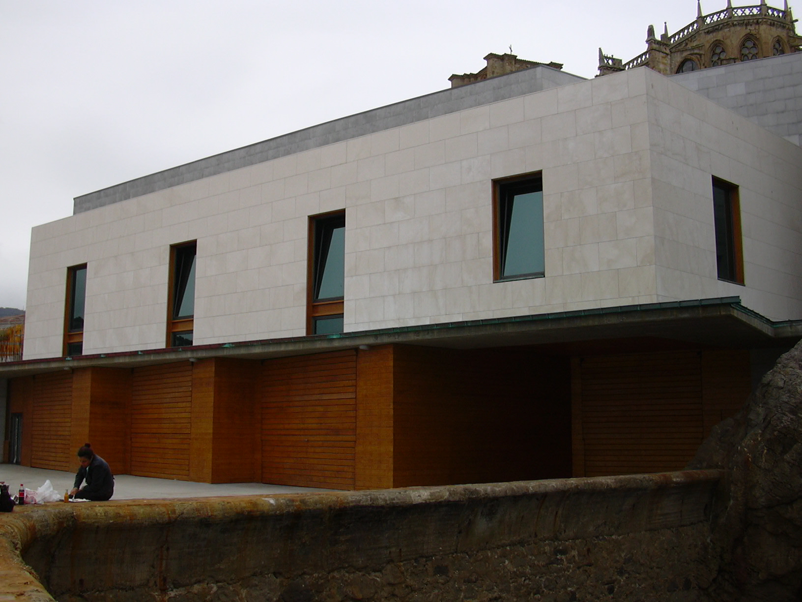 Pabellón de Actividades Náuticas en el Puerto de Castro Urdiales, utilizado por la Sociedad Deportiva de Remo Castro Urdiales, además de por clubes de buceo y piragüismo. Detrás se ve la Iglesia de Santa María de la Asunción.